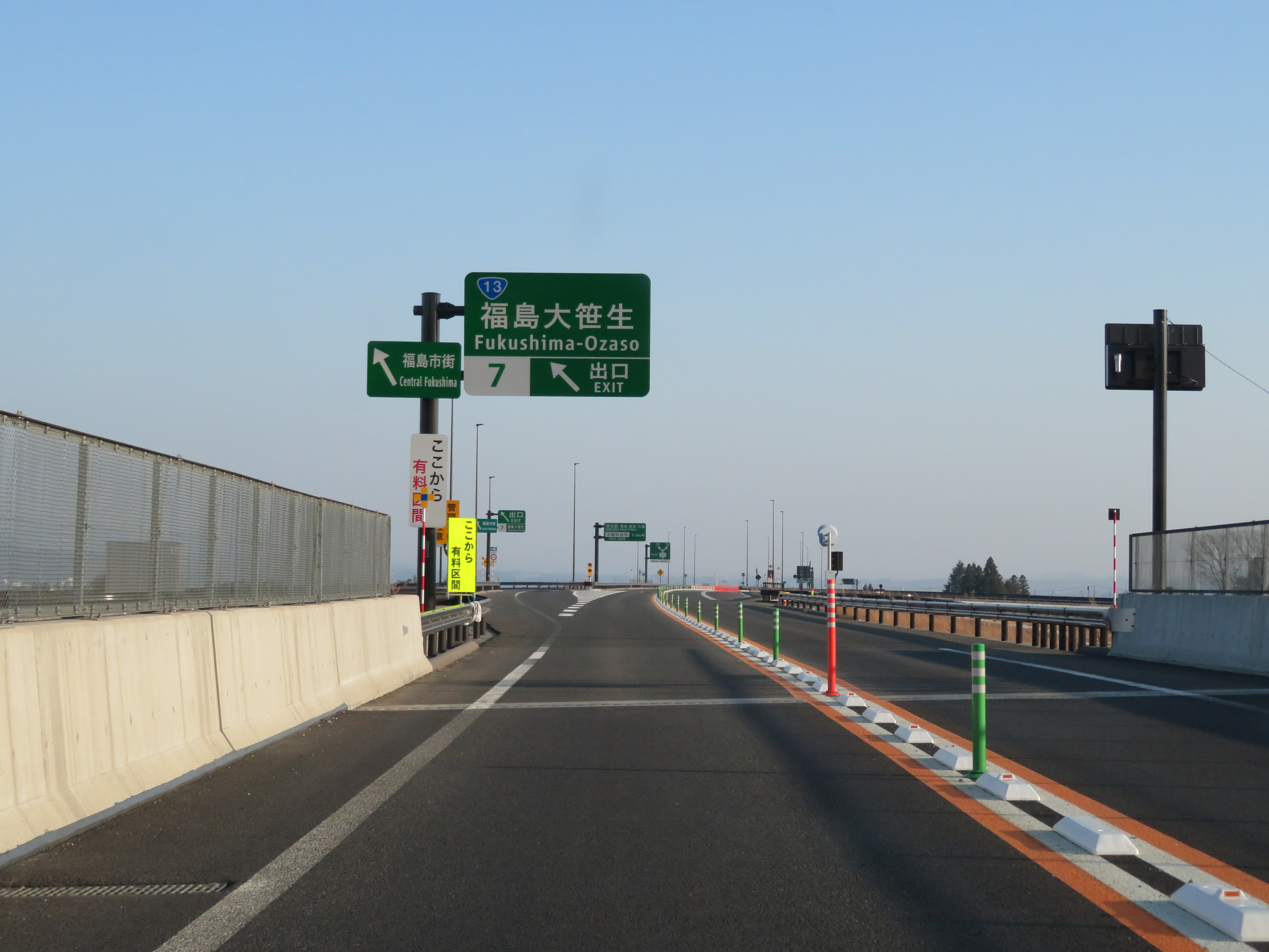 東北中央自動車道福島大笹生ＩＣ出口付近（米沢方面側から撮影）